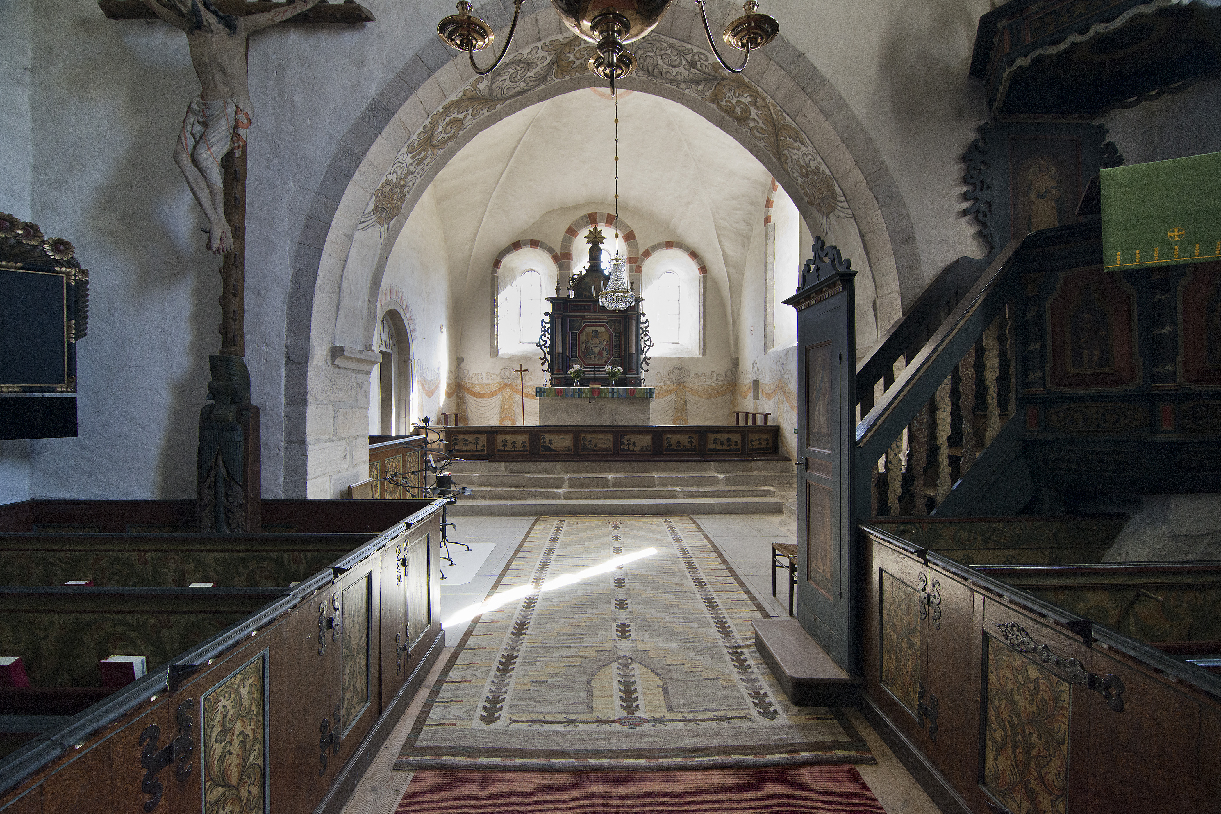 Tingstäde kyra - koret